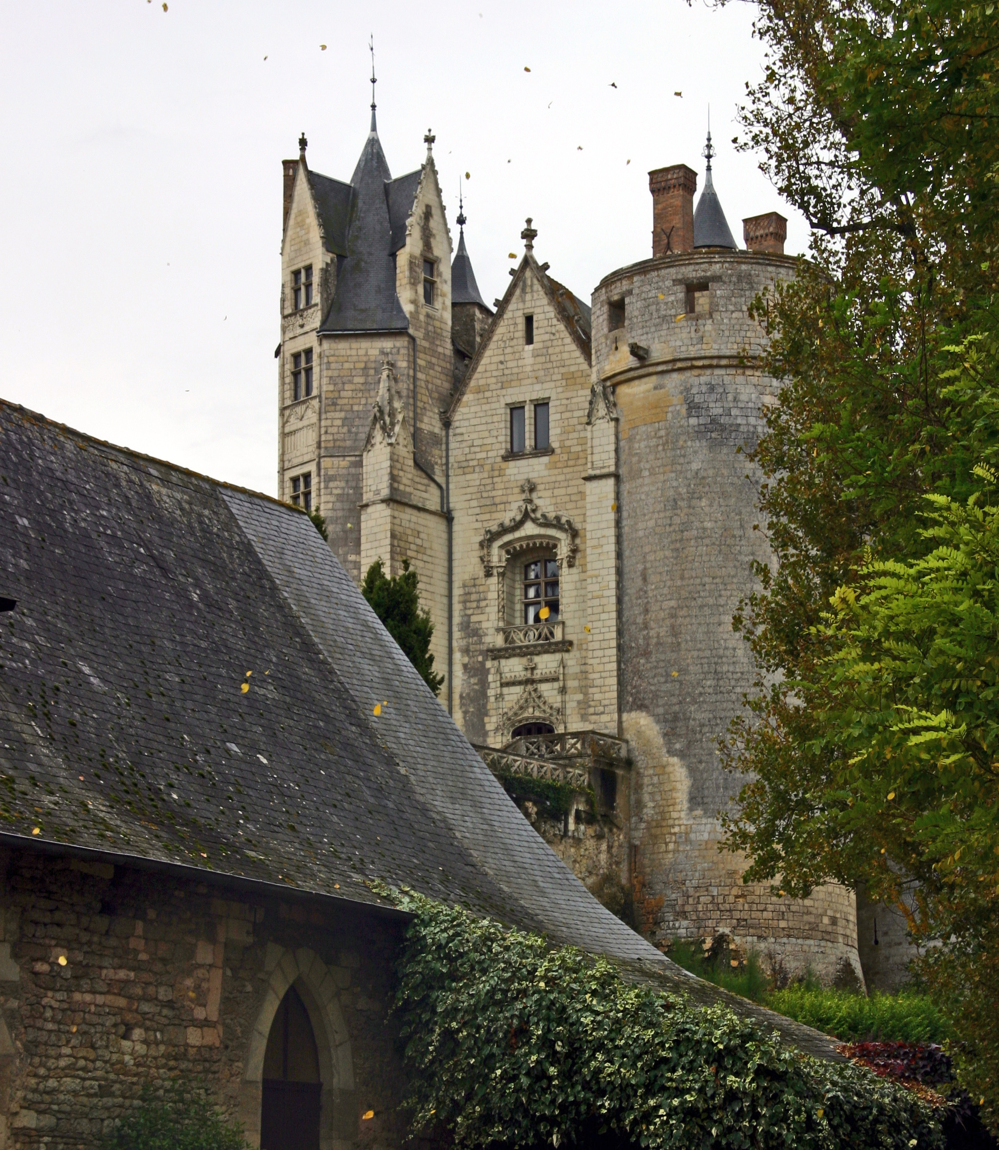 Schloss Montreuil-Bellay